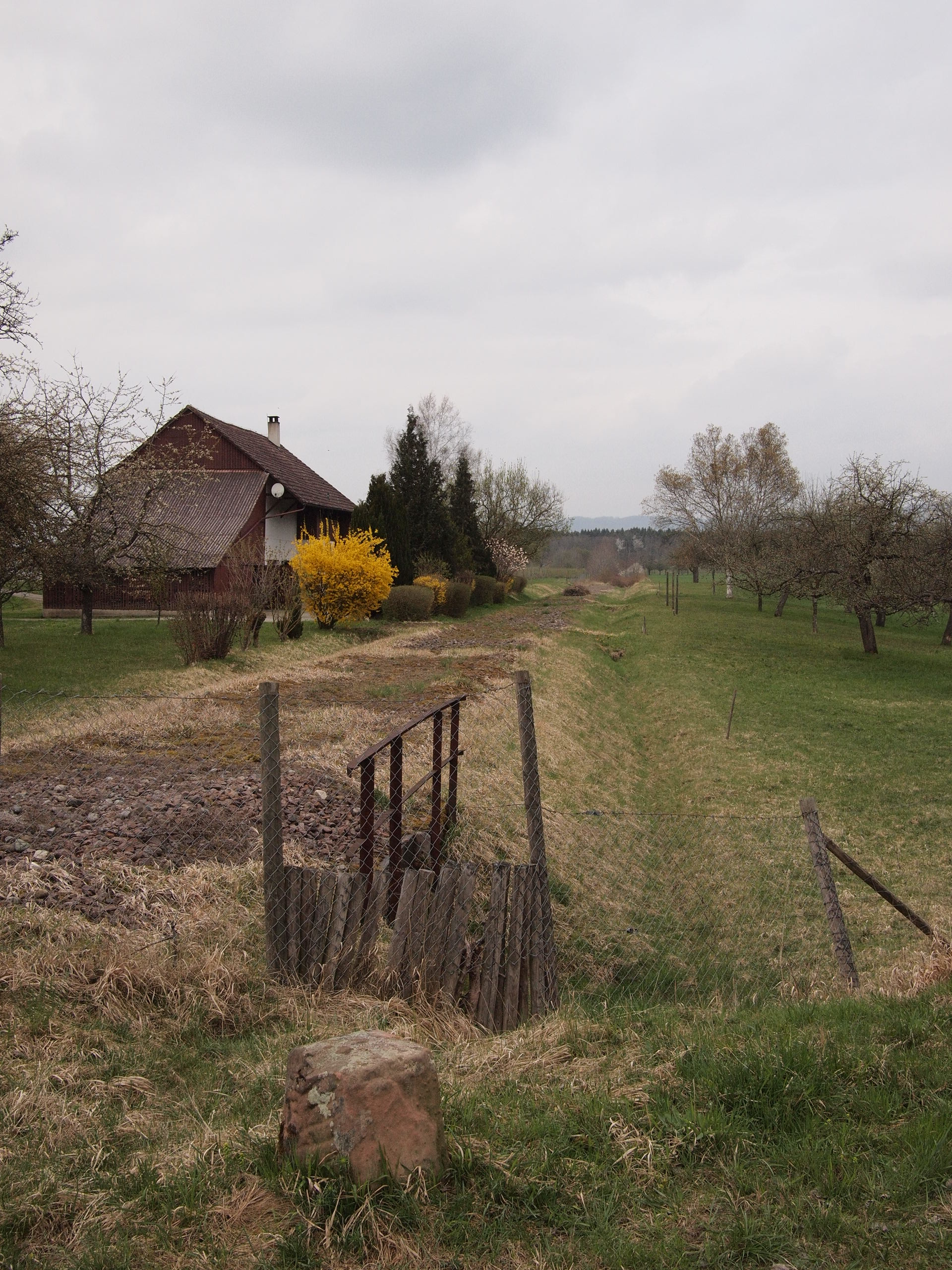 Überbleibsel der Bahnstrecke Mimmenhausen-Neufrach–Frickingen